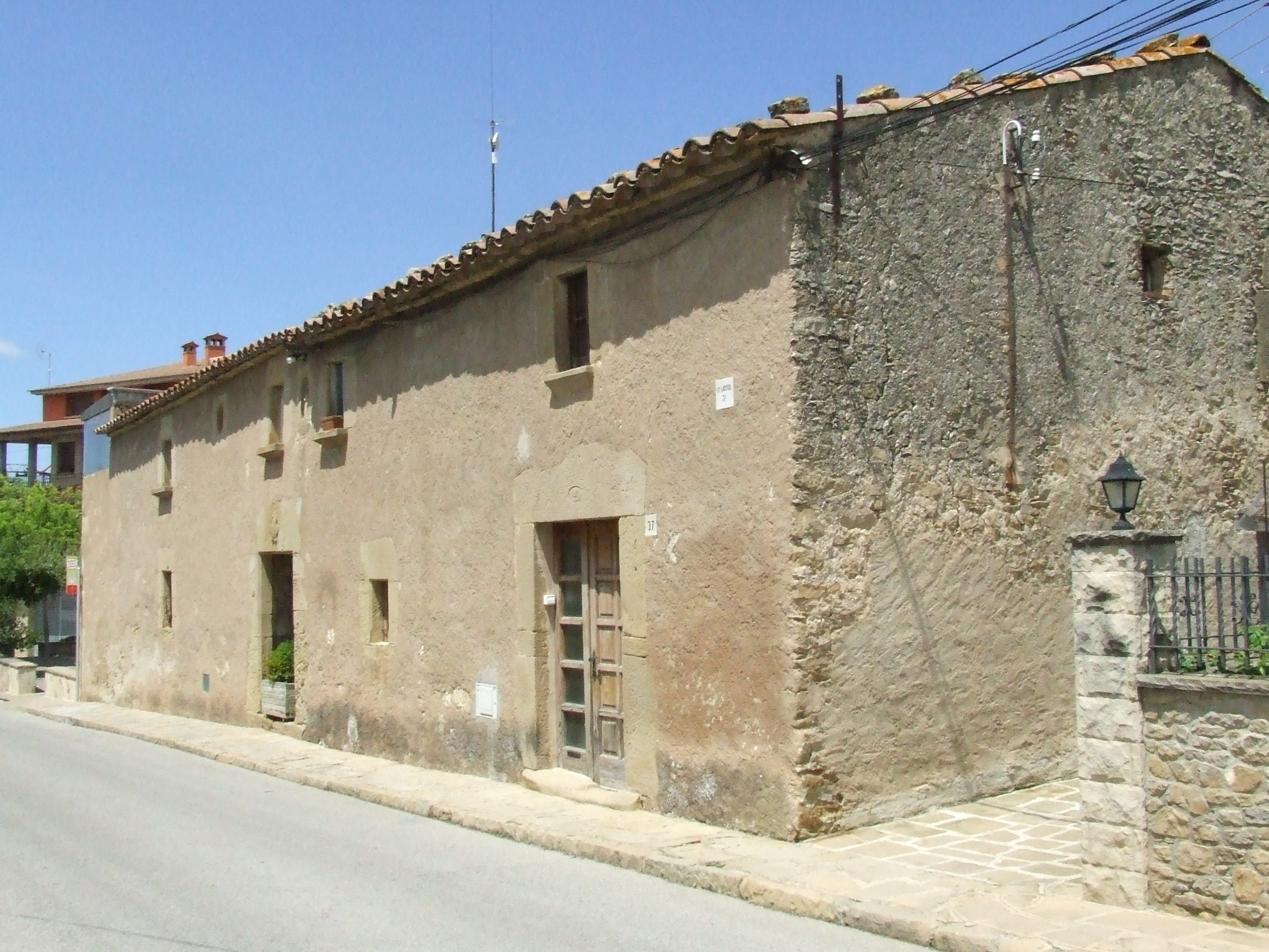 Cal Salvador, actual Casa de la Vila (Castellcir, Moianès)